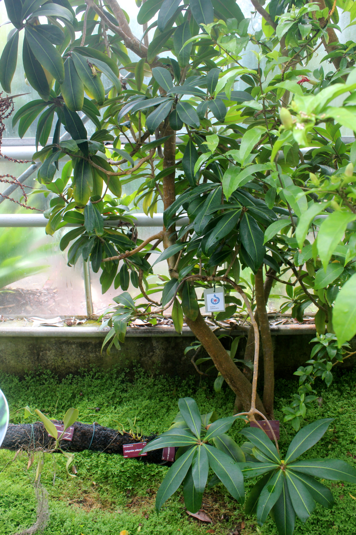 L'espèce "Badula balfouriana" dans les serres tropicales du Conservatoire Botanique National de Brest. Photo prise lors des journées contributives au Conservatoire Botanique National de Brest durant l'été 2015.